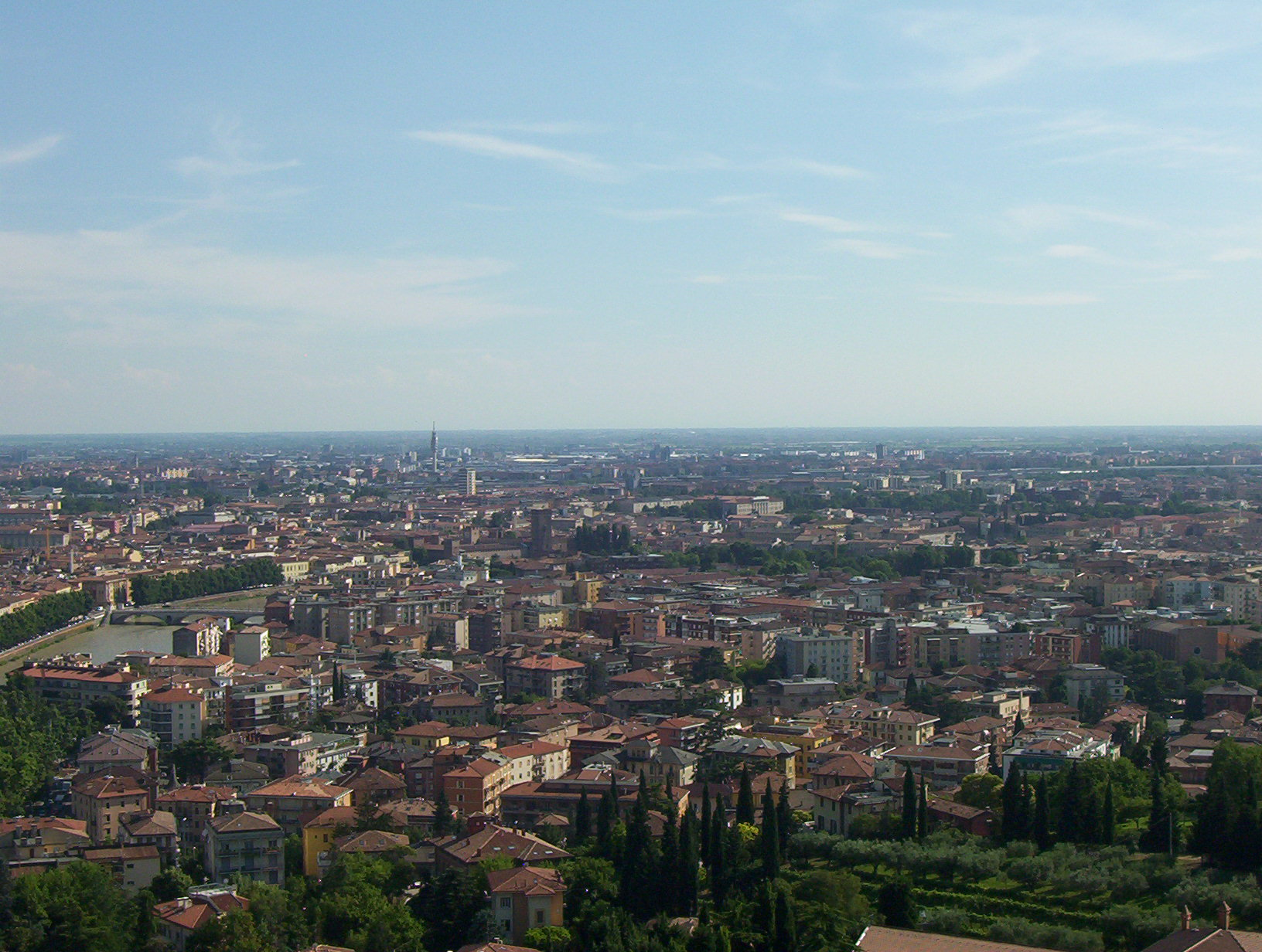 Panorama di Borgo Trento di Verona da forte San Leonardo